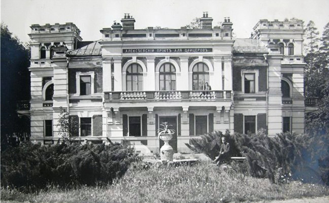 Алексеевский приют для раненых, увечных и престарелых офицеров при селе Всехсвятском.